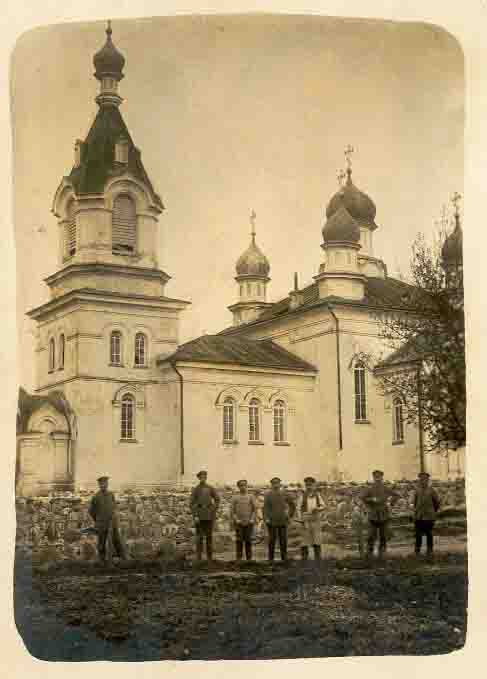 Беларуская (тарашкевіца): Моўчадзь (Moŭčadź), вуліца Калесьніцкая (vulica Kaleśnickaja). Петрапаўлаўская царква-мураўёўка